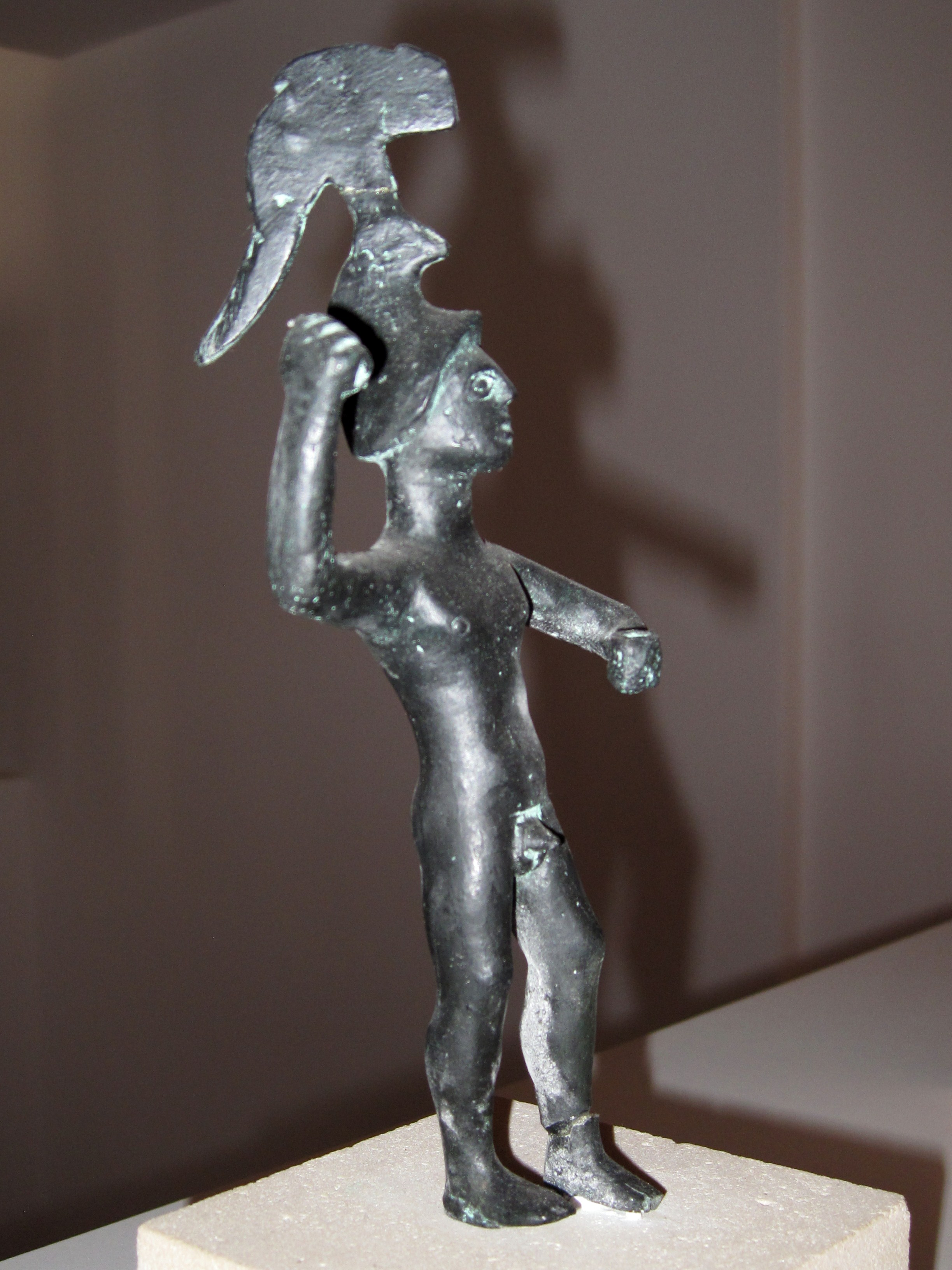 Mars Balearicus, Kopie einer Kriegerstatue aus Son Favar (Gemeinde Capdepera) aus dem 4. bis 3. Jahrhundert v. Chr., im Regionalmuseum von Artà (Museu Regional d’Artà), Gemeinde Artà, Mallorca, Spanien